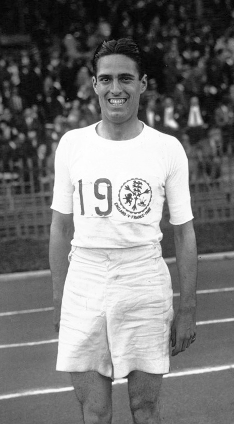 Colombes : match d'athlétisme France Angleterre : Lowe (anglais) gagnant du 800 m. (portrait) : [photographie de presse] / Agence Meurisse